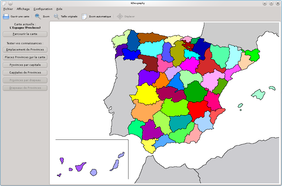 KGeography en français, carte des provinces espagnoles